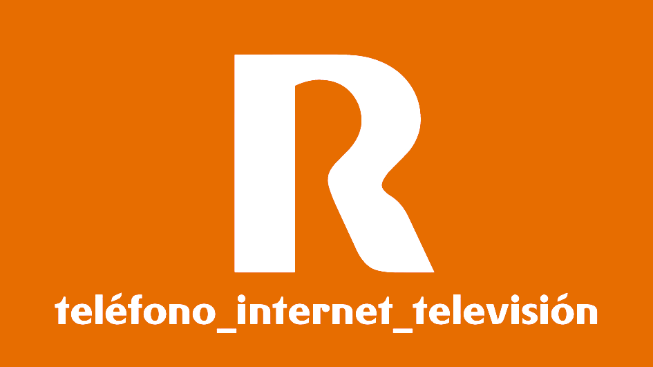 Logotipo oficial de R cable y telecomunicaciones de Galicia, S.A.